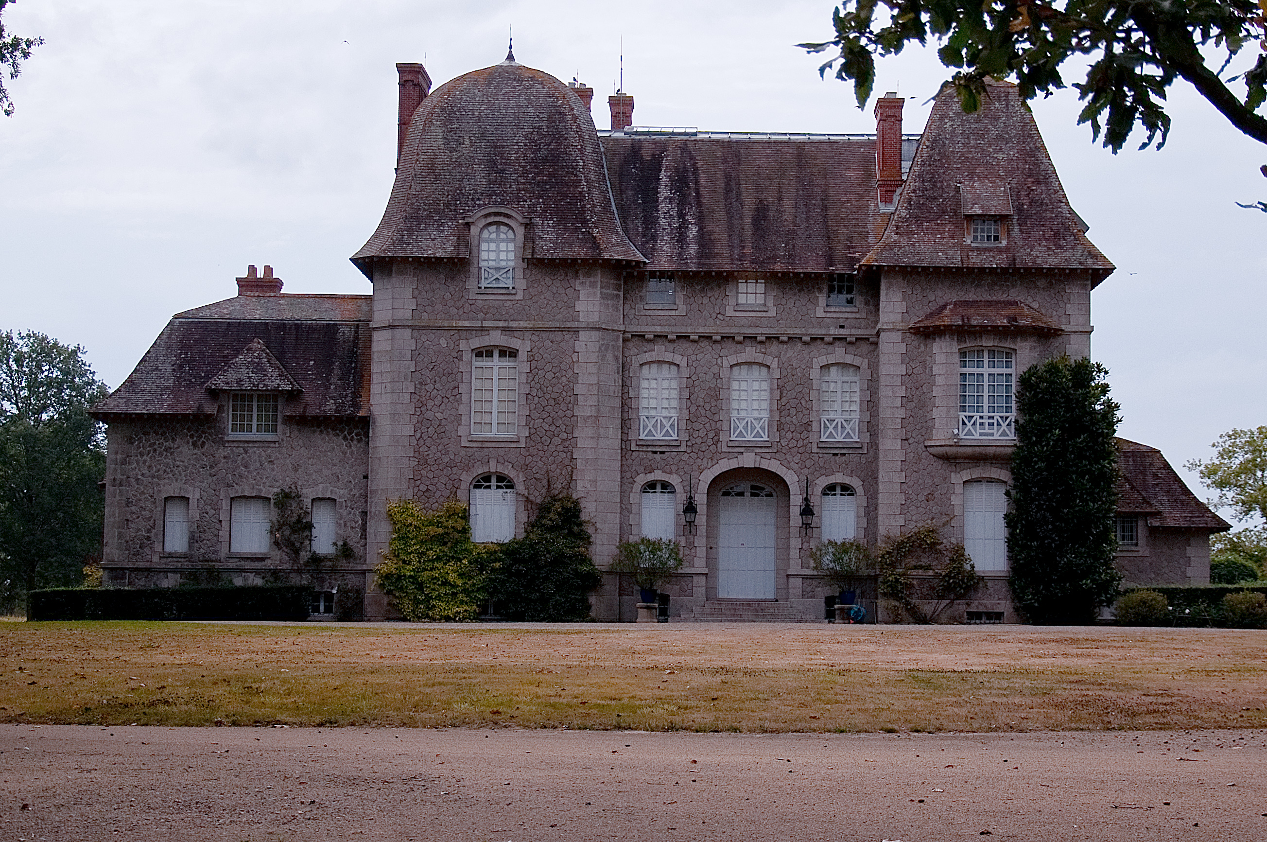 Vue de façade du Château du Bois-Rouaud (Chéméré, 44). .